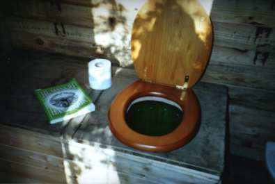 Compost toilet photo by G Burnett quercus robur